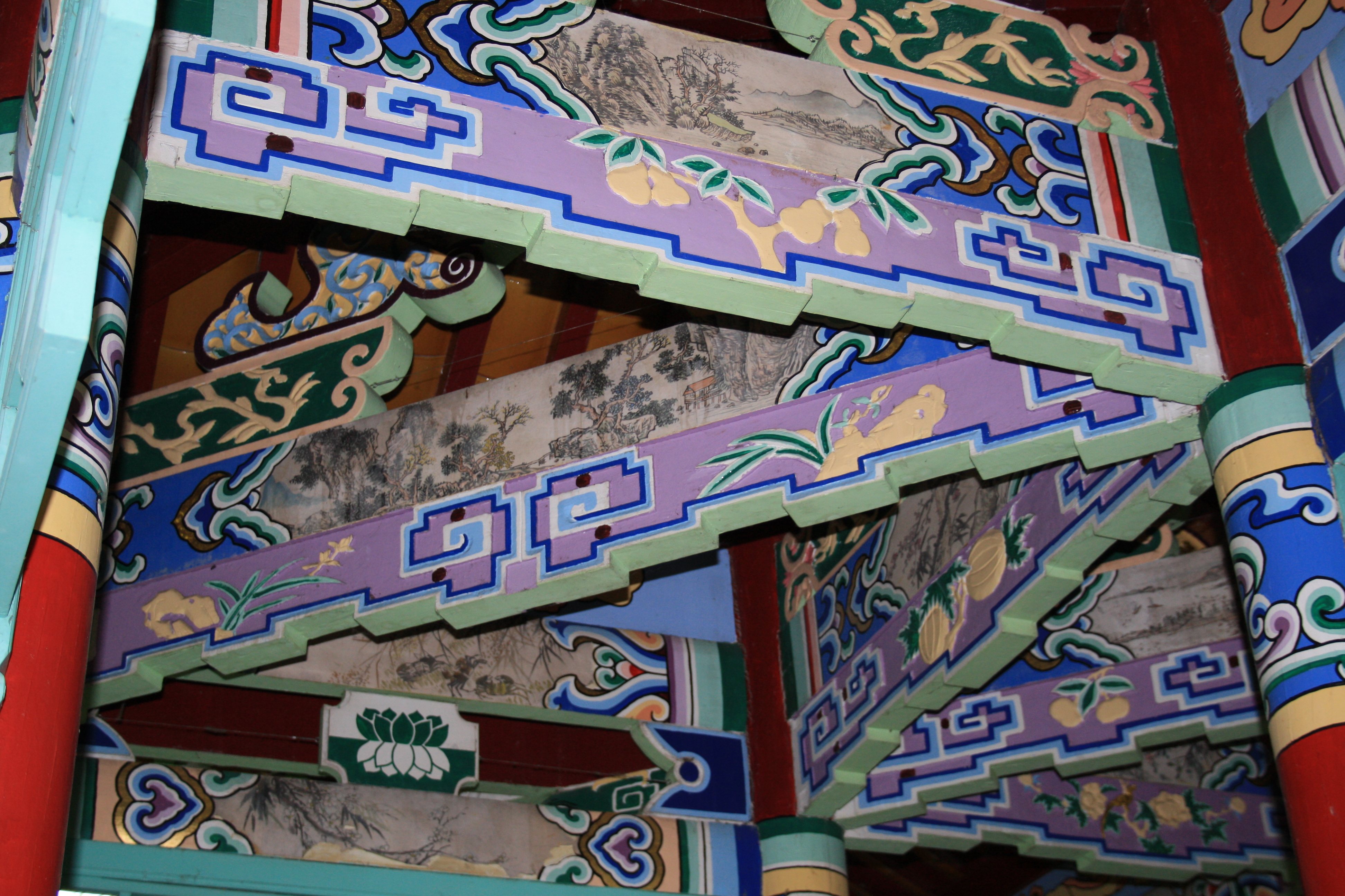 Chinagarten Zürich (Switzerland)